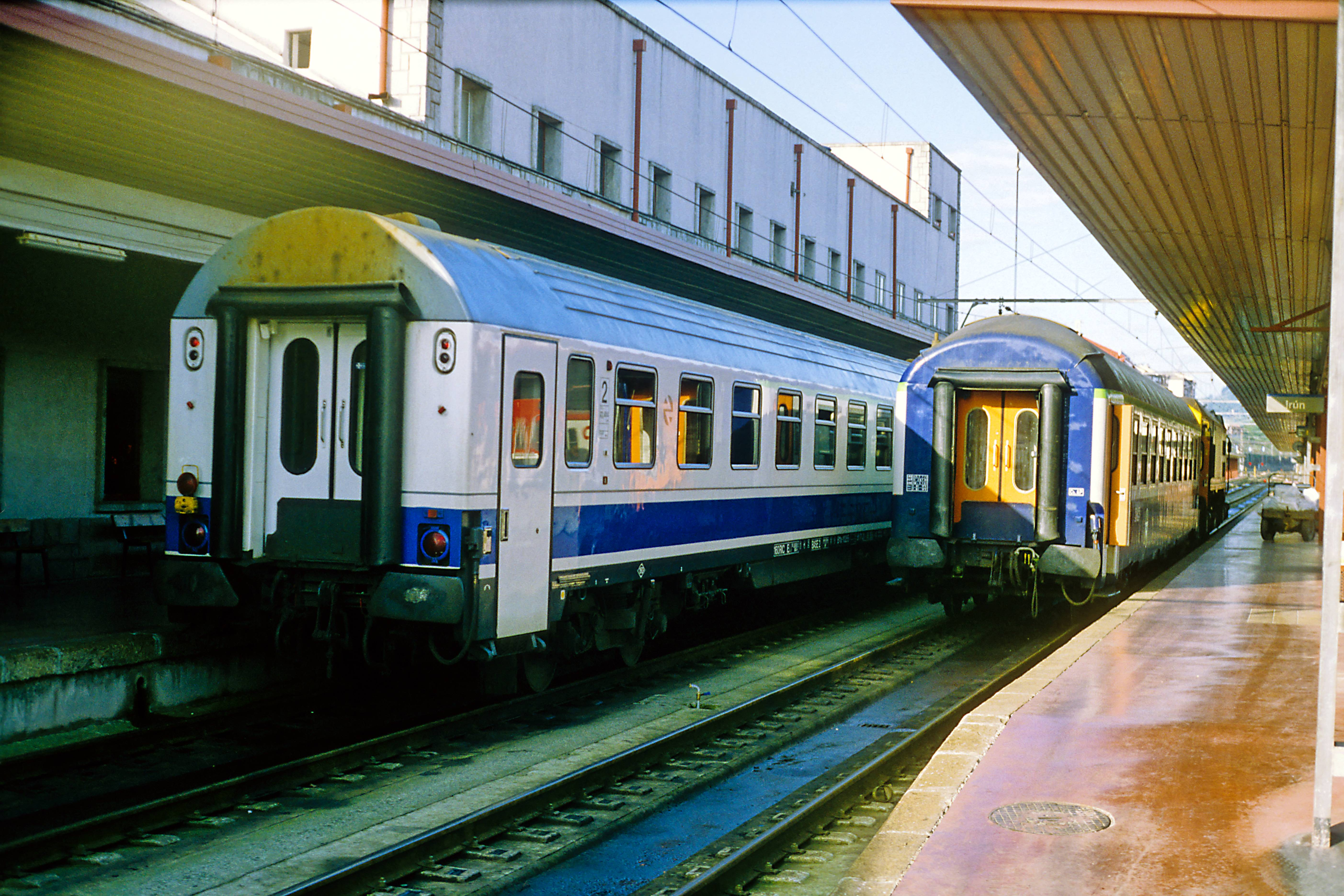 Renfe-Corail-Nachbau im Intercity-Anstrich, daneben der SNCF-Kurswagen Paris–Algeciras